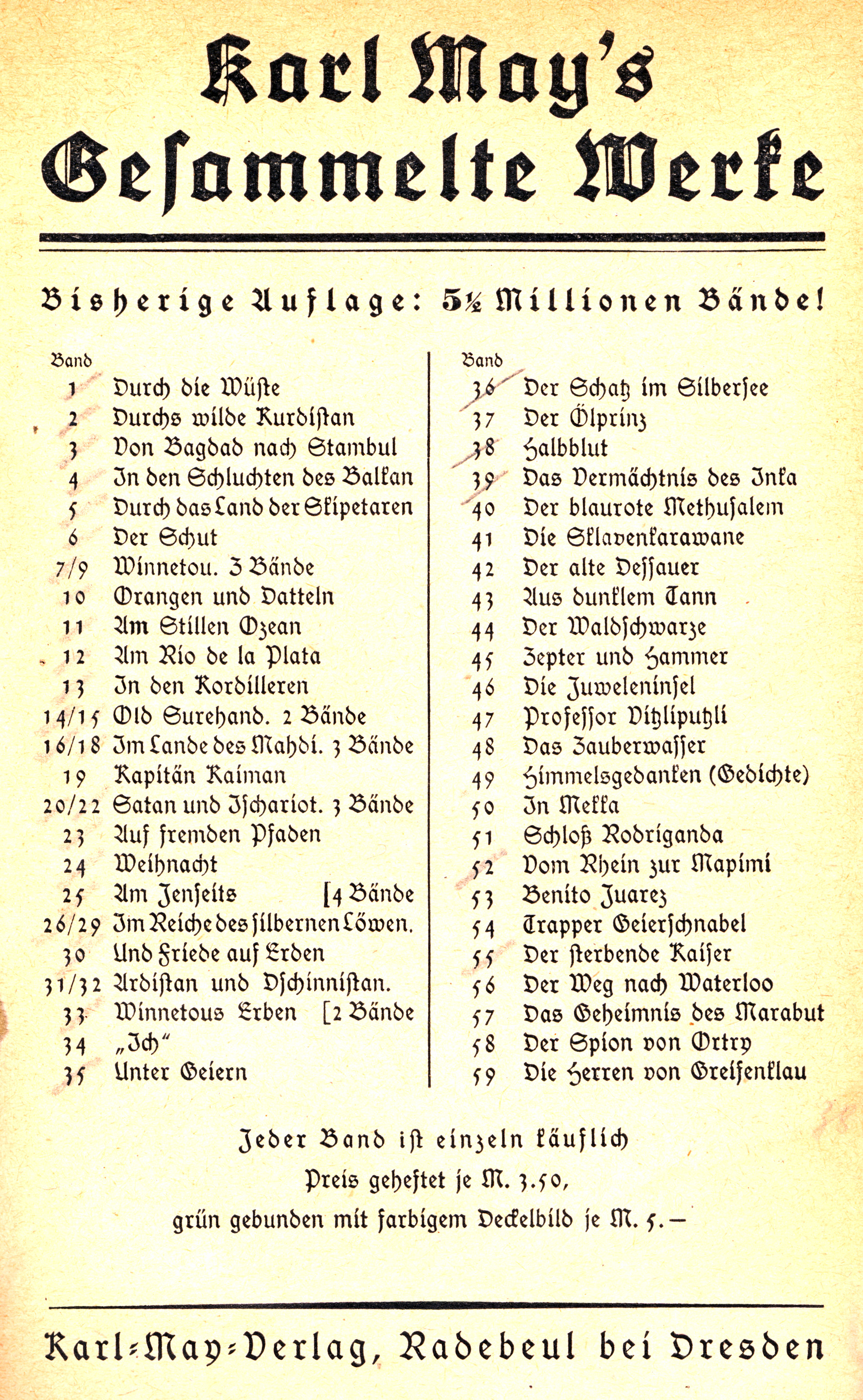 Karl May's Gesammelte Werke, 1916, eigener Scan